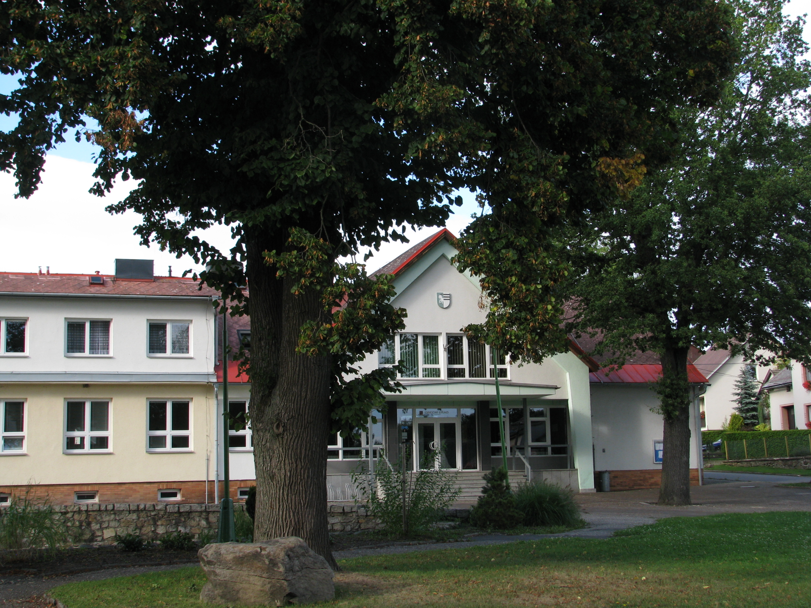 Jámy obecní úřad